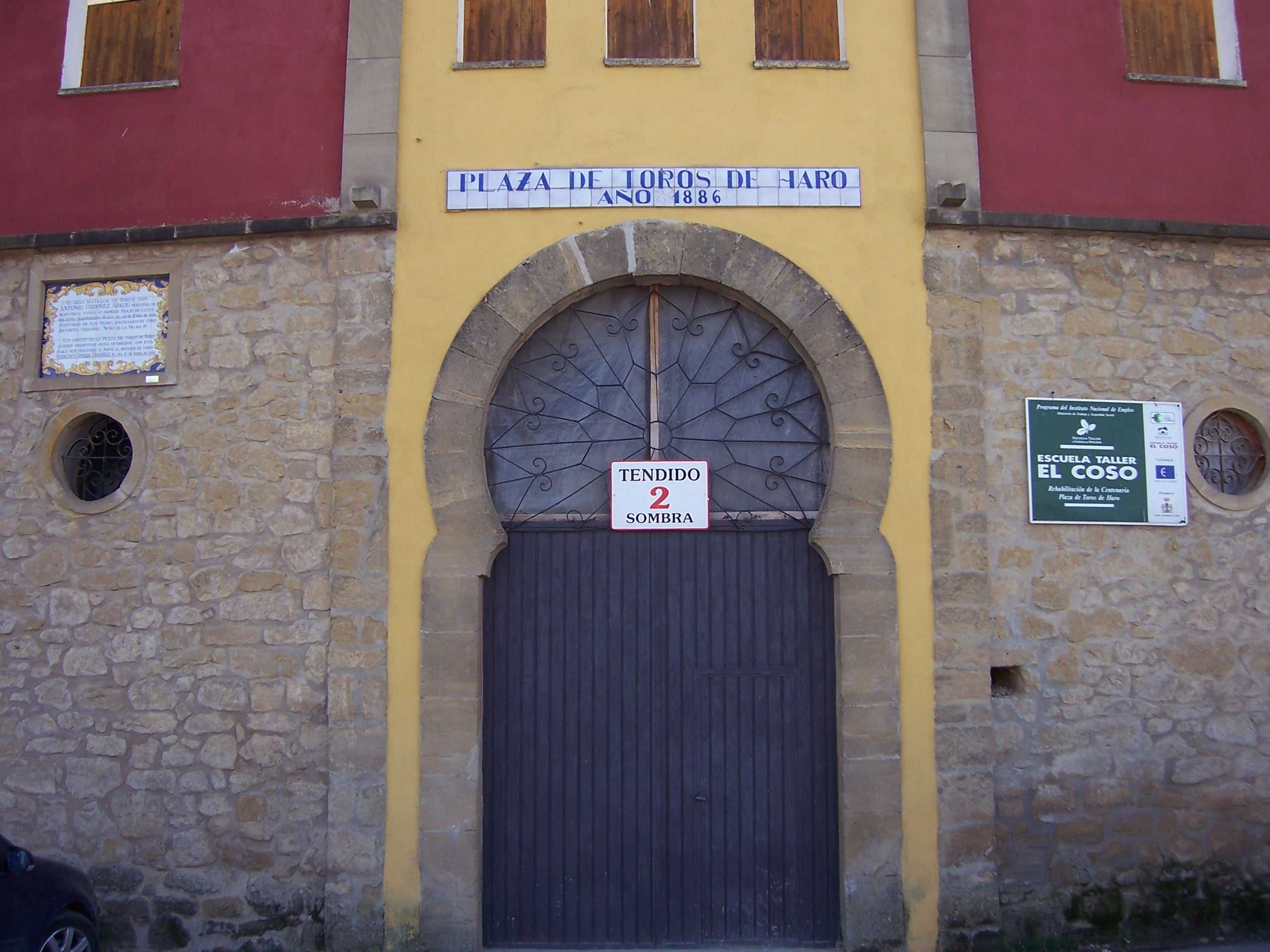 Acceso a tendido 2 de la Plaza de Toros de Haro, La Rioja (España)